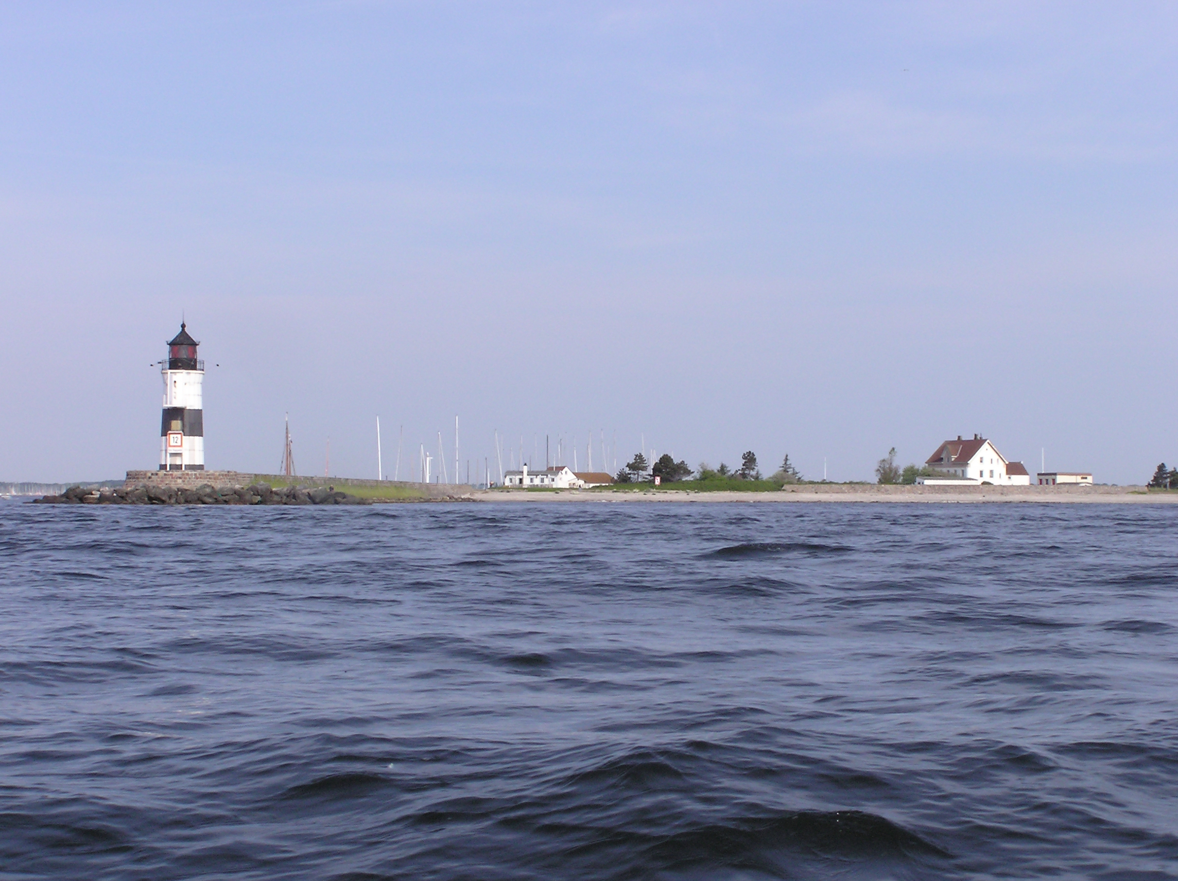 Schleimünde